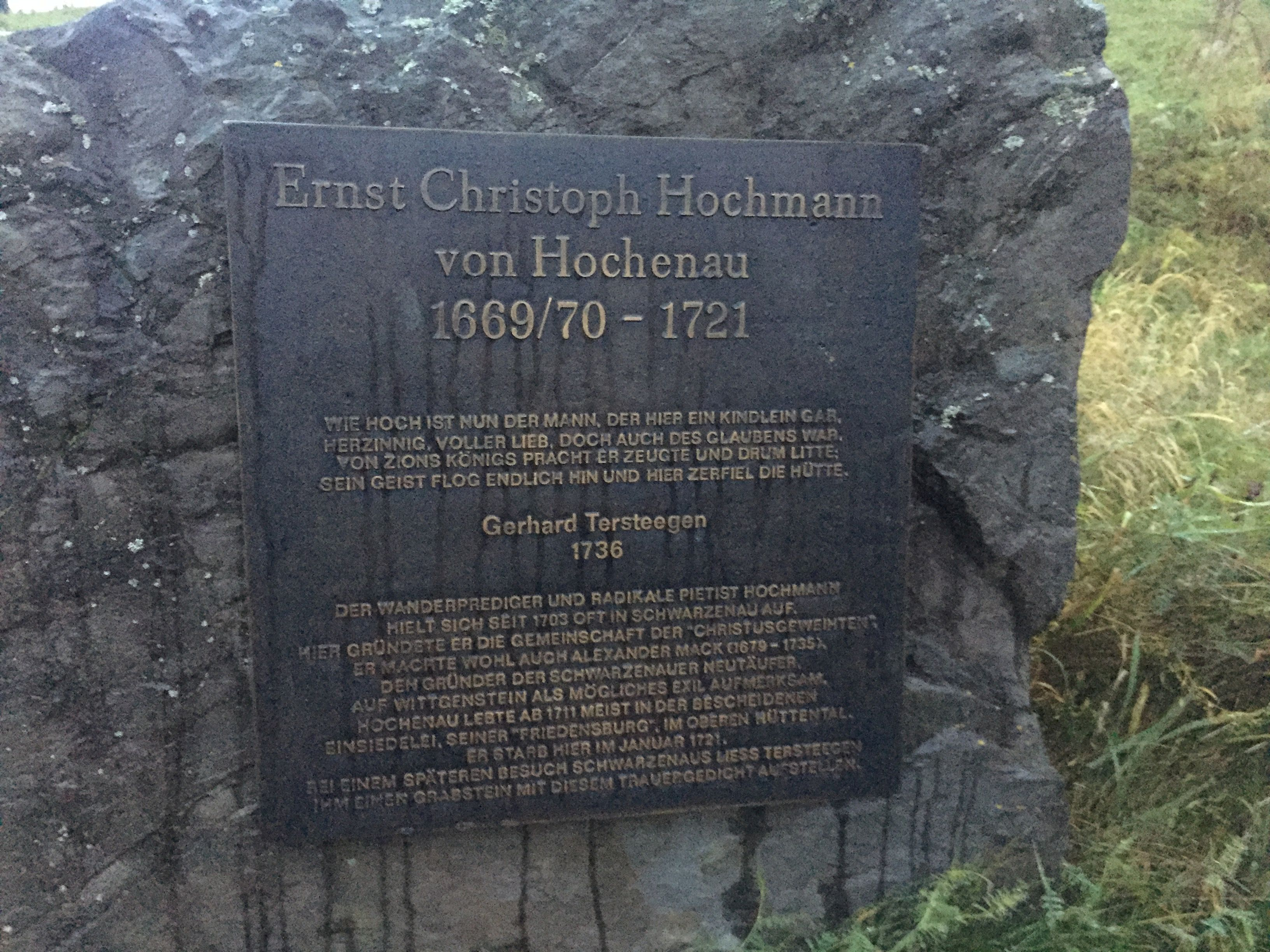 Nahaufnahme des Textes des Gedenksteines in Schwarzenau: "Ernst Christoph Hochmann von Hochenau 1669/70 - 1721 Wie hoch ist nun der Mann, der hier ein Kindlein gar, Herzinnig, voller Lieb, doch auch des Glaubens war, Von Zions Königs Pracht er zeugte und drum litte; Sein Geist flog endlich hin und hier zerfiel die Hütte. Gerhard Terstegen 1736 Der Wanderprediger und radikale Pietist Hochmann hielt sich seit 1703 oft in Schwarzenau auf. Hier gründete er die Gemeinschaft der "Christusgeweihten", er machte wohl auch alexander Mack (1679-1735), den Gründer der Schwarzenauer Neutäufer, auf Wittgenstein als mögliches Exil aufmerksam. Hochenau lebte ab 1711 meist in der bescheidenen Einsiedelei, seiner "Friedensburg", im oberen Hüttental. Er starb hier im Januar 1721. Bei einem späteren Besuch Schwarzenaus ließ Terstegen ihm einen Grabstein mit diesem Trauergedicht aufstellen."